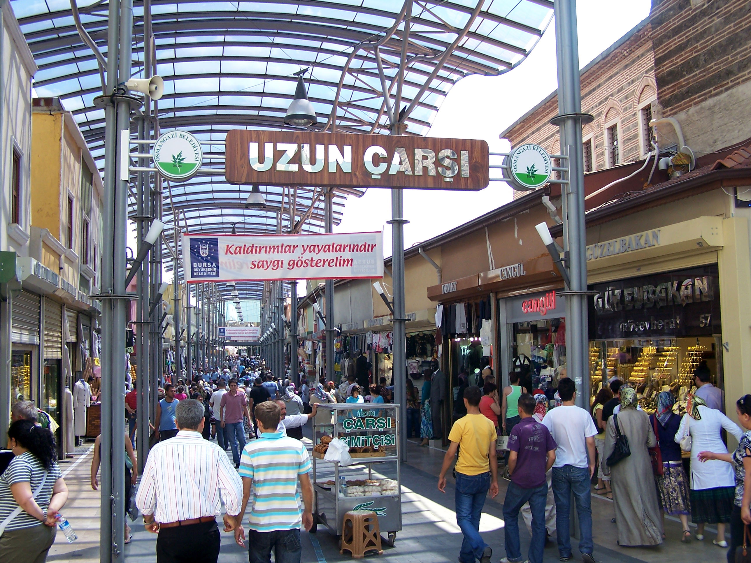 Uzun Çarşı in Bursa, Turkey